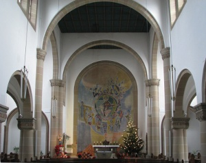 Herz-Jesu-Kirche in Mannheim-Neckarstadt-West.